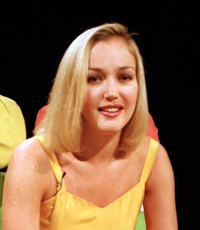 ספיר קופמן קאופמן